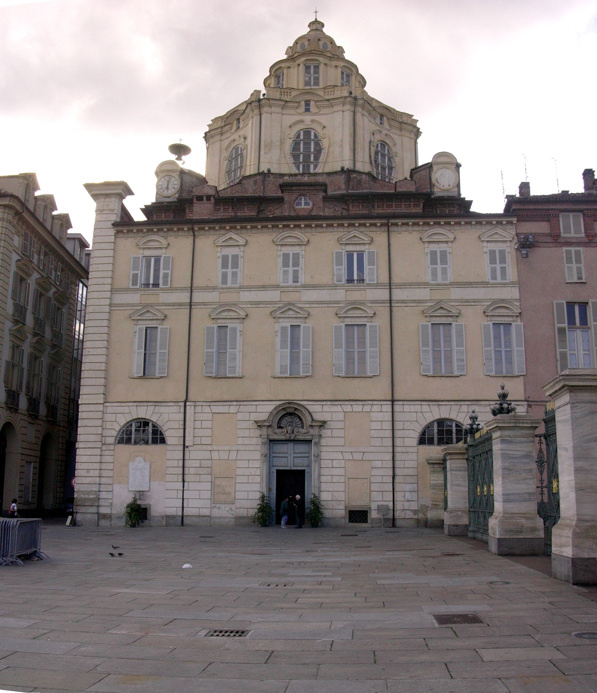 Autore: Claudio Cavallero Fonte: Foto scattata dall'autore Descrizione: chiesa di San Lorenzo a Torino